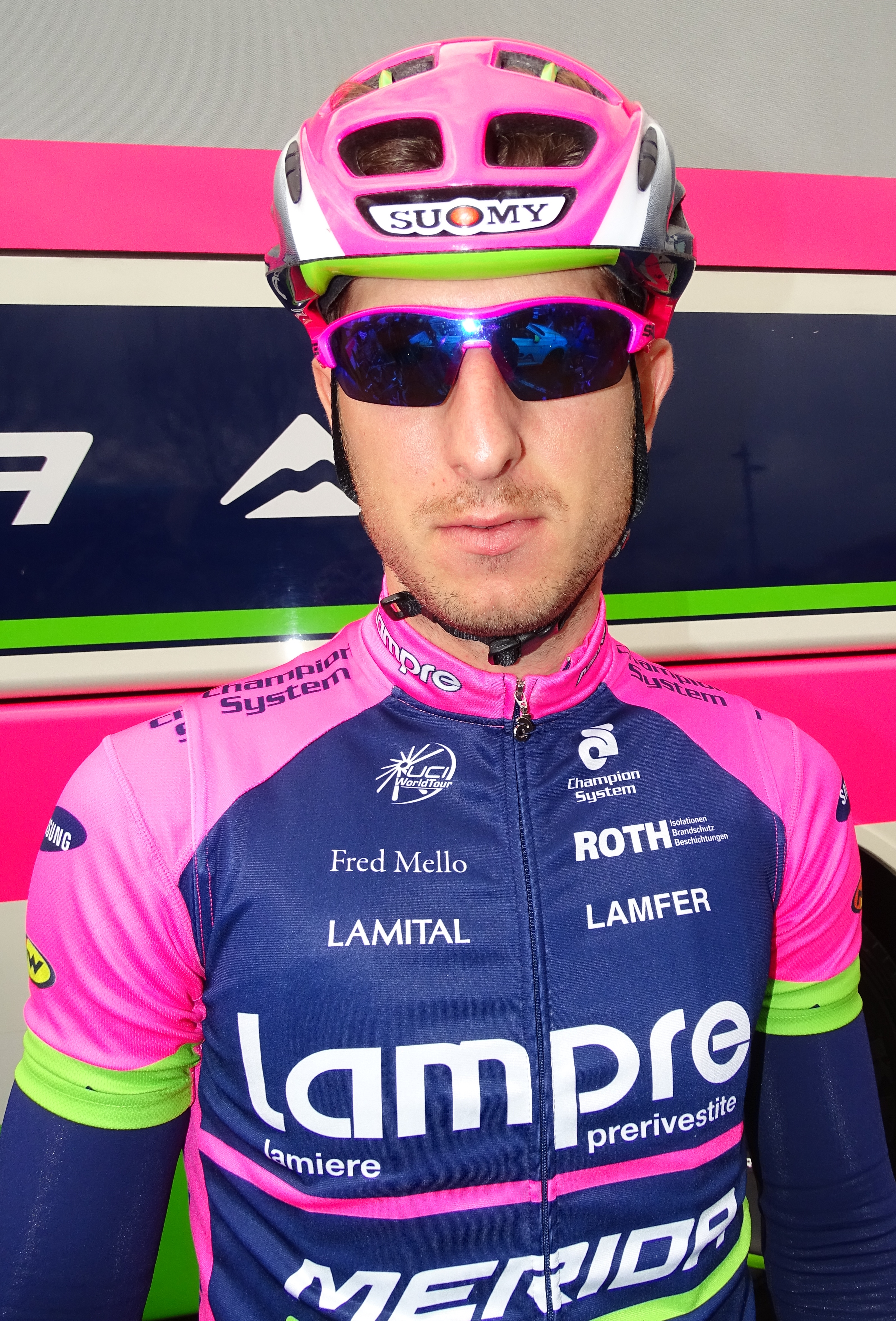 Reportage réalisé le mardi 31 mars à l'occasion de du départ de la première étape des Trois jours de La Panne 2015 à La Panne, Belgique.